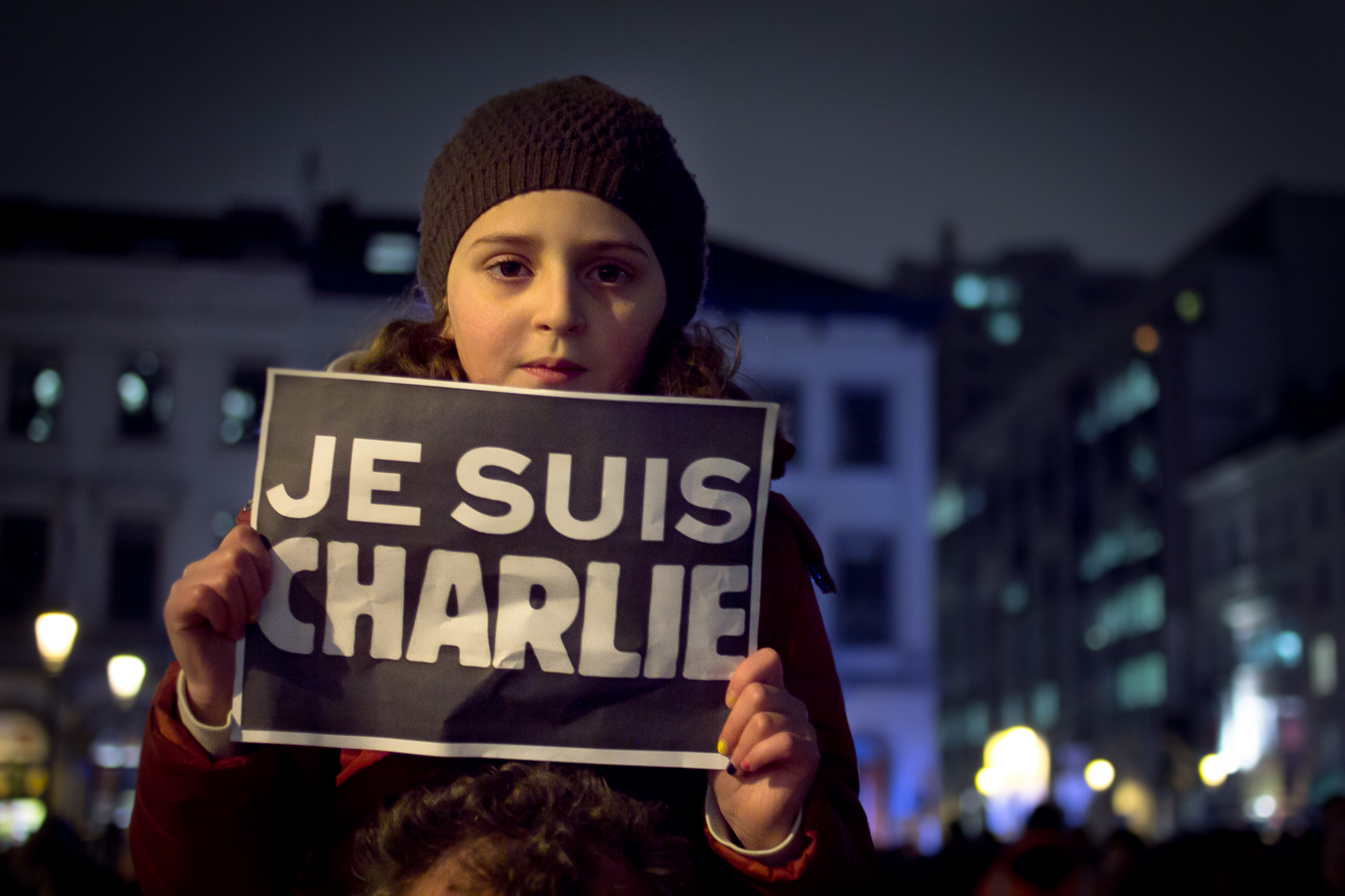 Rassemblement solidaire pour les attentat du 7 Janvier 2015 à la rédaction de "Charlie Hebdo", Place Luxembourg, Bruxelles.